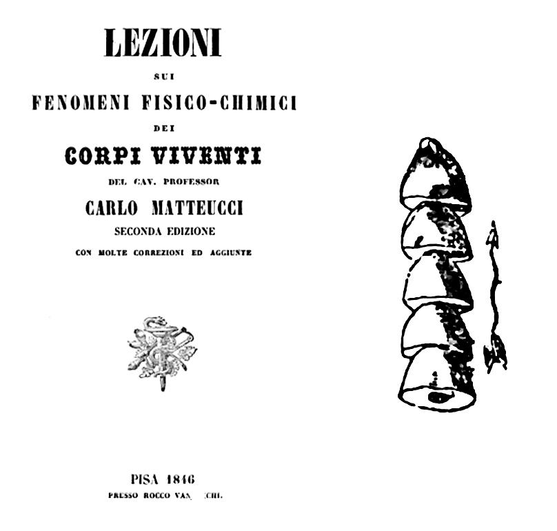 Preparato di rana per lo studio dei fenomeni elettrici nel muscolo